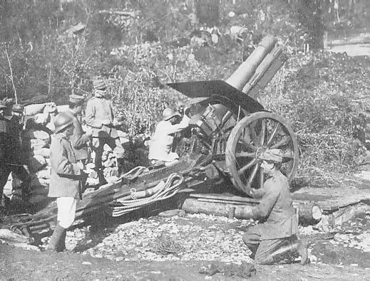 obice da 149/12 mod. 1914